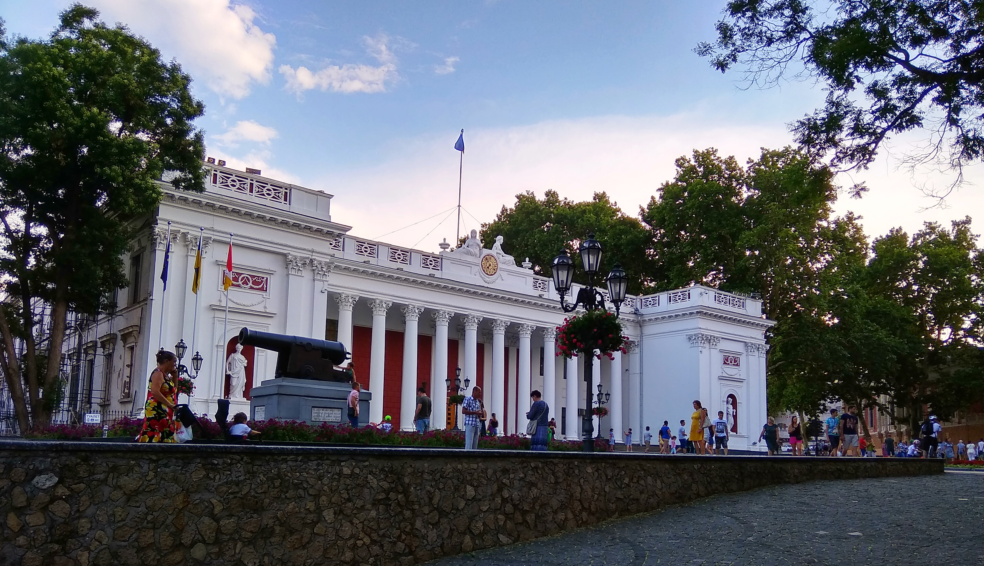 Будівля старої біржі, де 14 (27) січня 1918 року відбулися загальні збори робітничих, селянських, матроських і солдатських депутатів, на яких було проголошено радянську владу у м. Одесі, Одеса, пл. Думська, 1